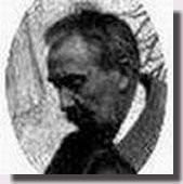 Jacques Grüber (1870-1936), artiste plastique et maître verrier